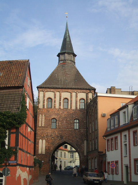 Das Stralsunder Kütertor von außen